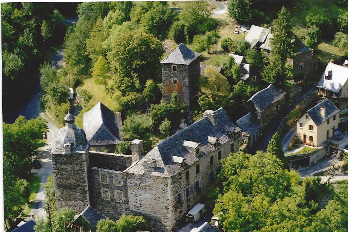 Le château est situé sur la commune de Coubisou, dans le département français de l'Aveyron.